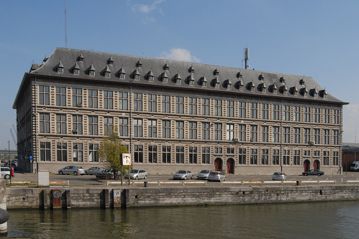 Het Havenhuis in de Haven van Antwerpen (brandweerkazerne, technische havendiensten, ...)